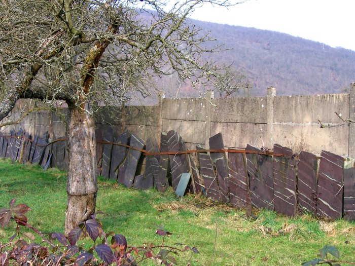 ancienne clôture en blocs d'ardoise à Haybes, Ardennes